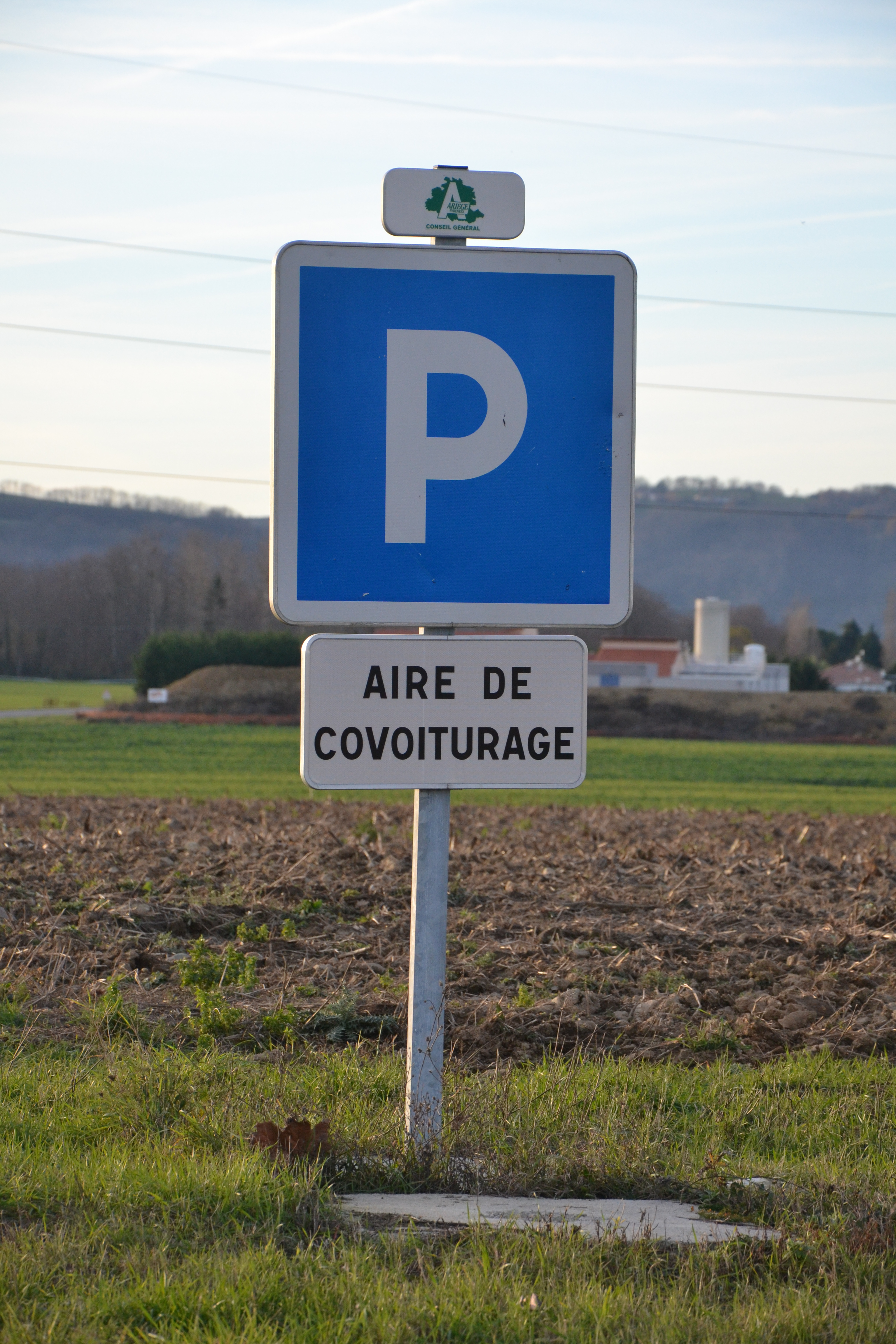 Panneau signalisant une aire de covoiturage mise en place par le Conseil général de l'Ariège, à La Tour-du-Crieu (Ariège, France)